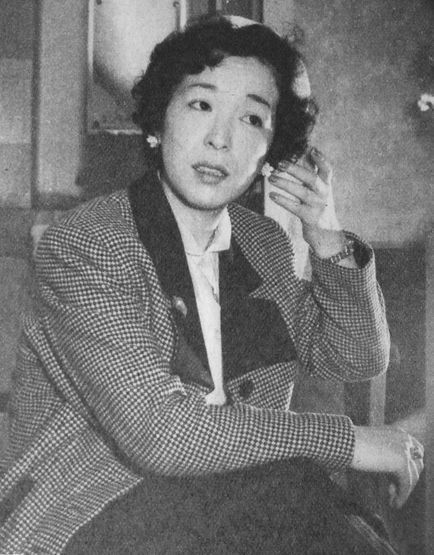 深緑夏子